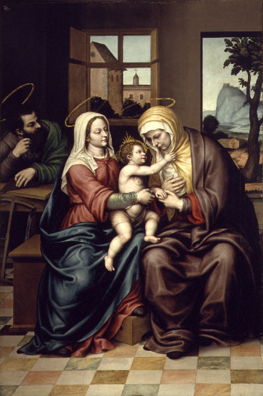 La obra representa a los tres miembros de la Sagrada Familia cristiana junto a Santa Ana, la madre de la Virgen María.